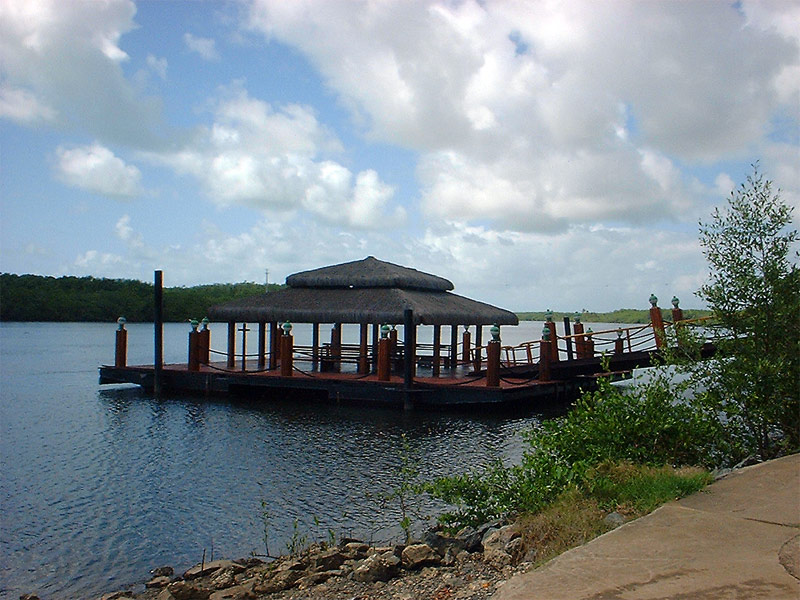 Ilha de Comandatuba - Bahia, Brasil.